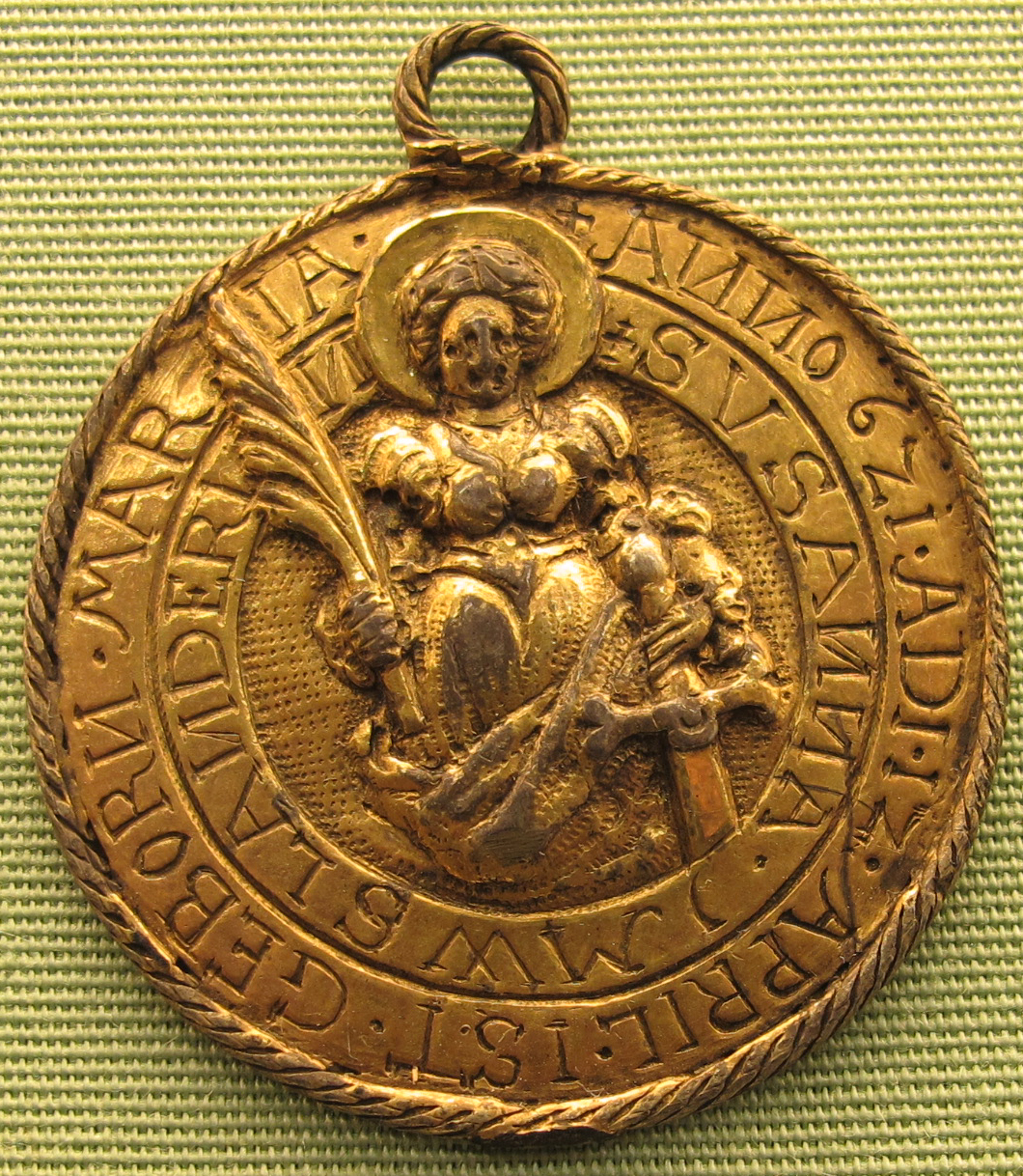 Ignoto, taufpfennig con caterina d'alessandria, 1621